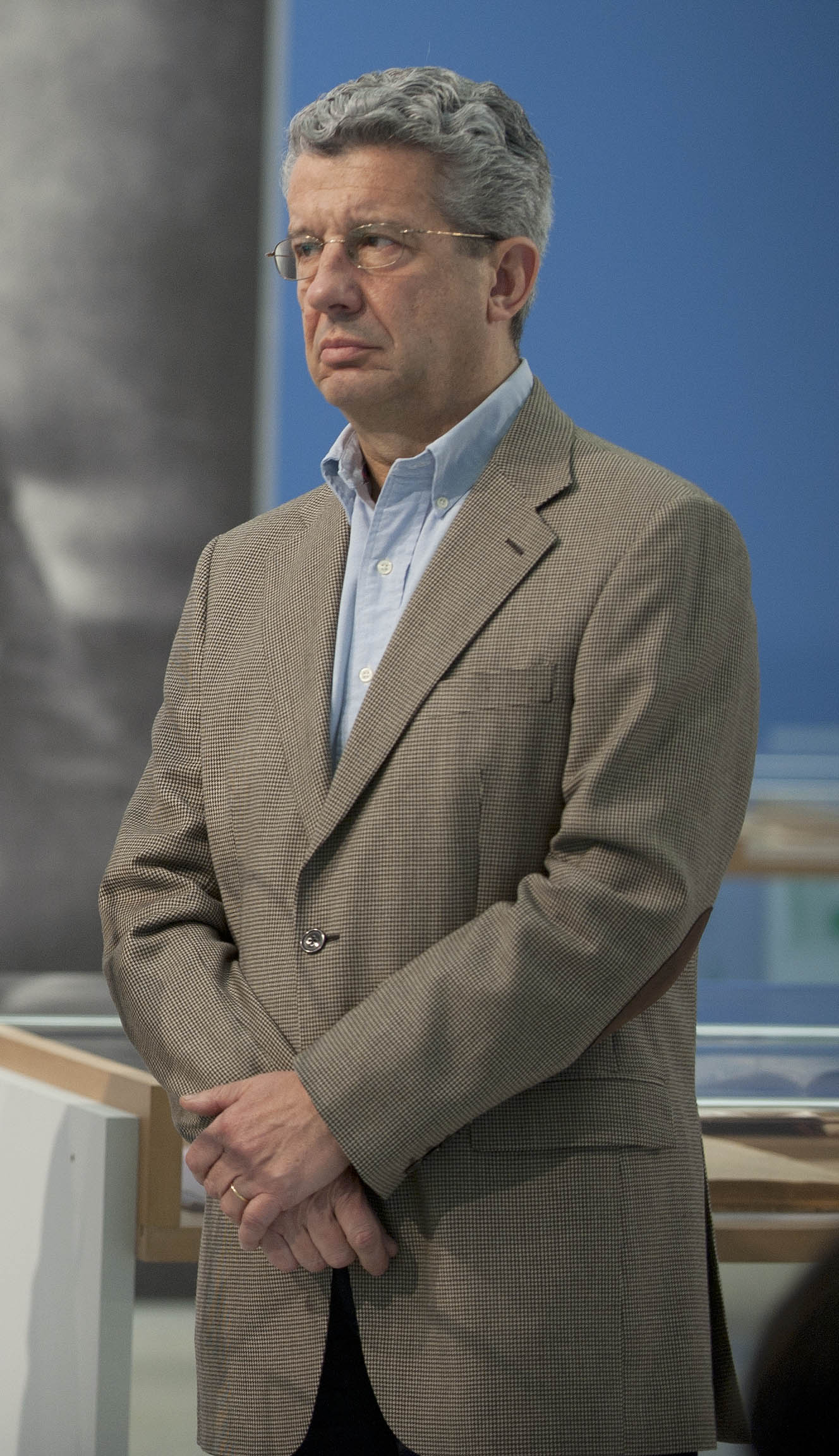 Ricardo Miralles, comisario de 'Indalecio Prieto en la política vasca, 1883-1962' en la presentación de la exposición